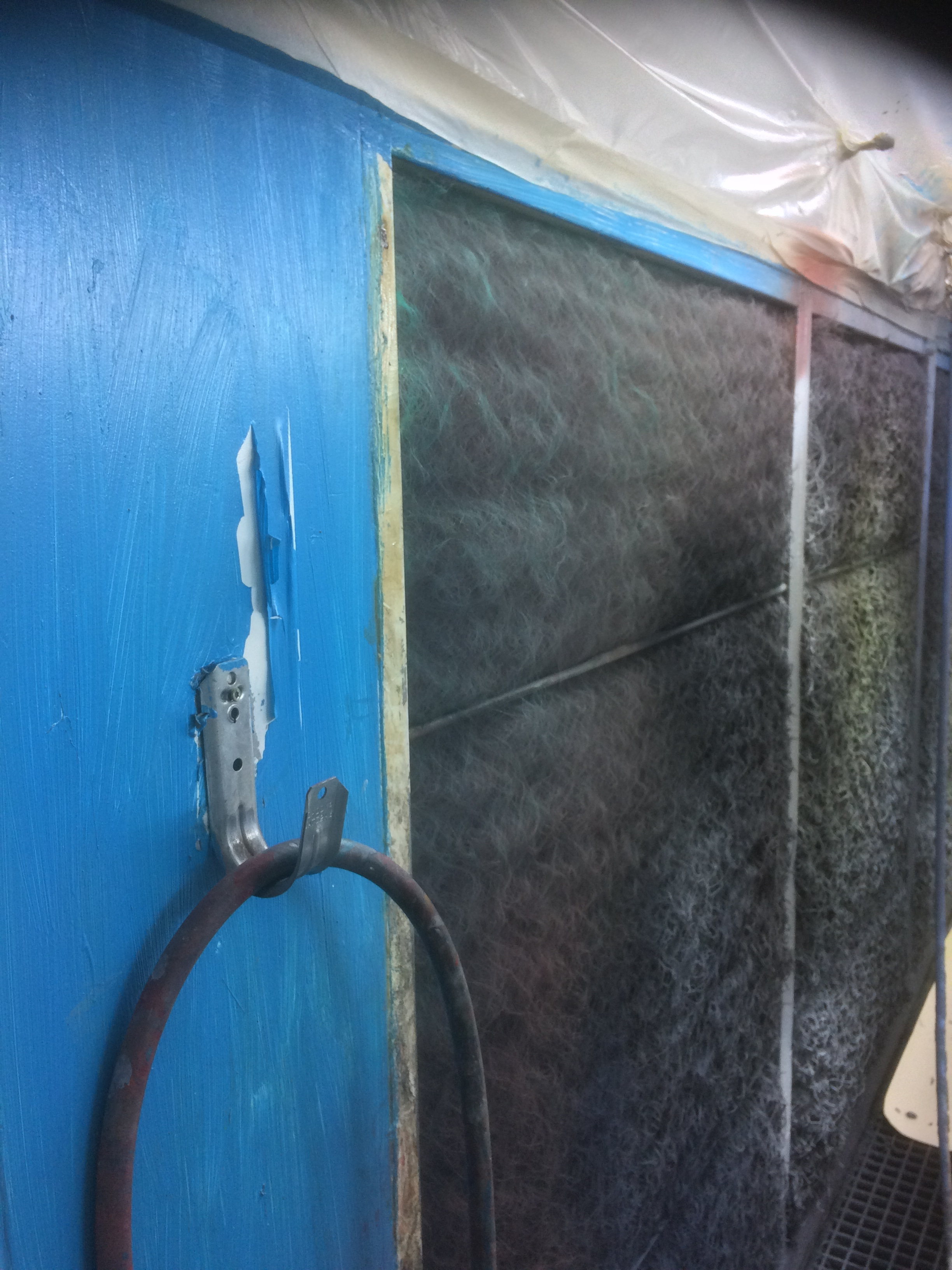 Ein blauer Abziehlack in der Lackierkabine. Dient zum Schutz der Wand vor dem Spritznebel. Nach 3-6 Monaten wird der Abziehlack abgezogen und erneuert